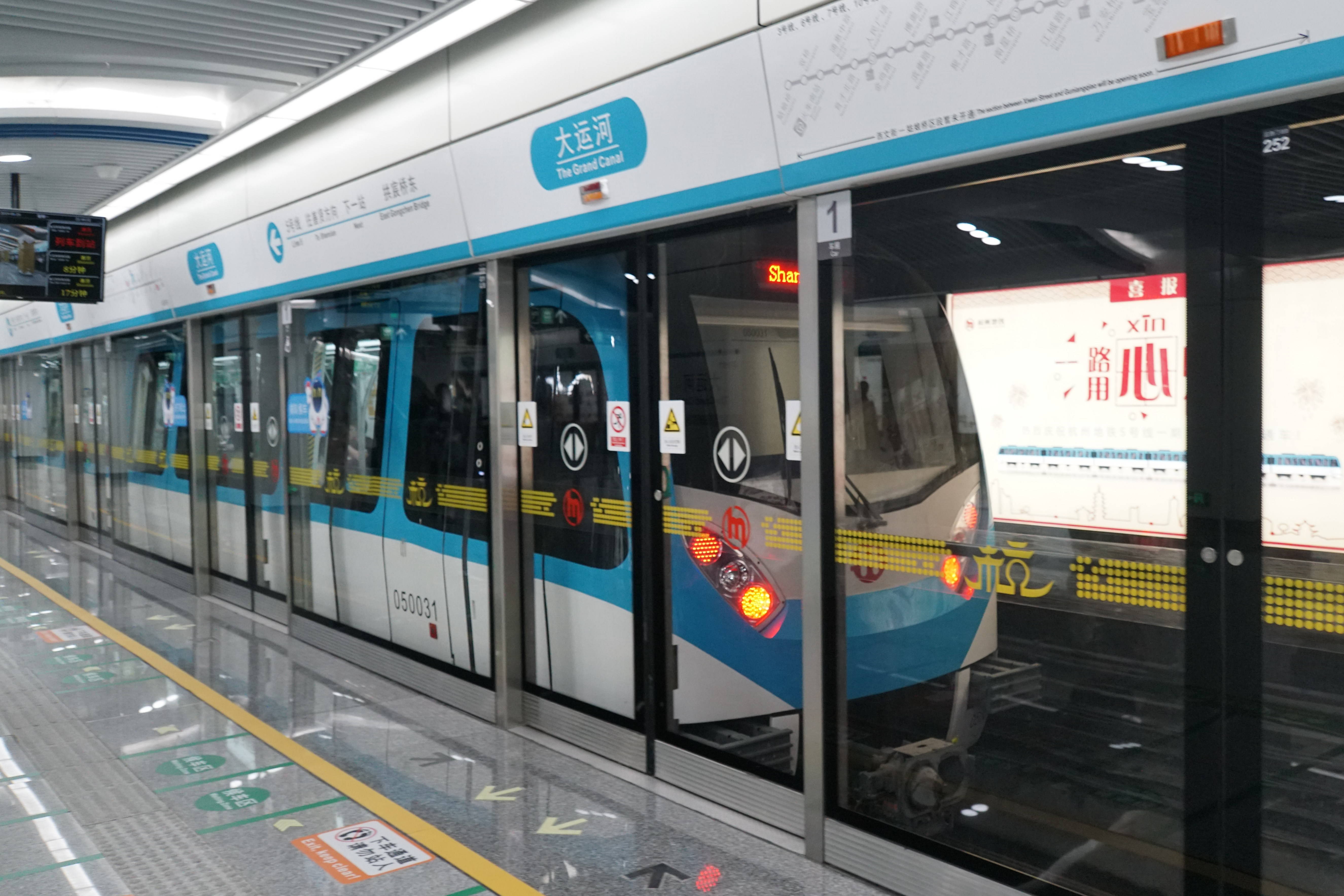 杭州地铁5号线列车离开大运河站